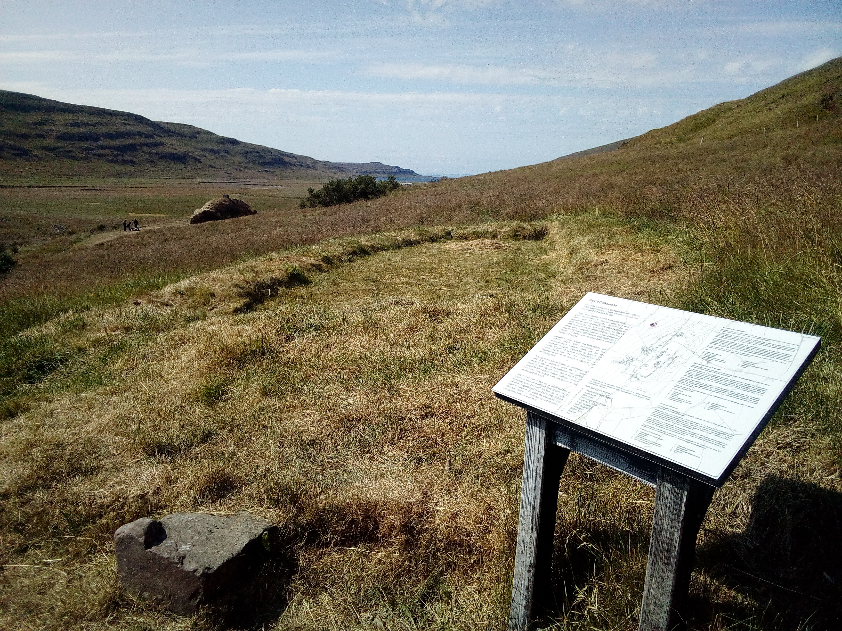 Eiríksstaðir